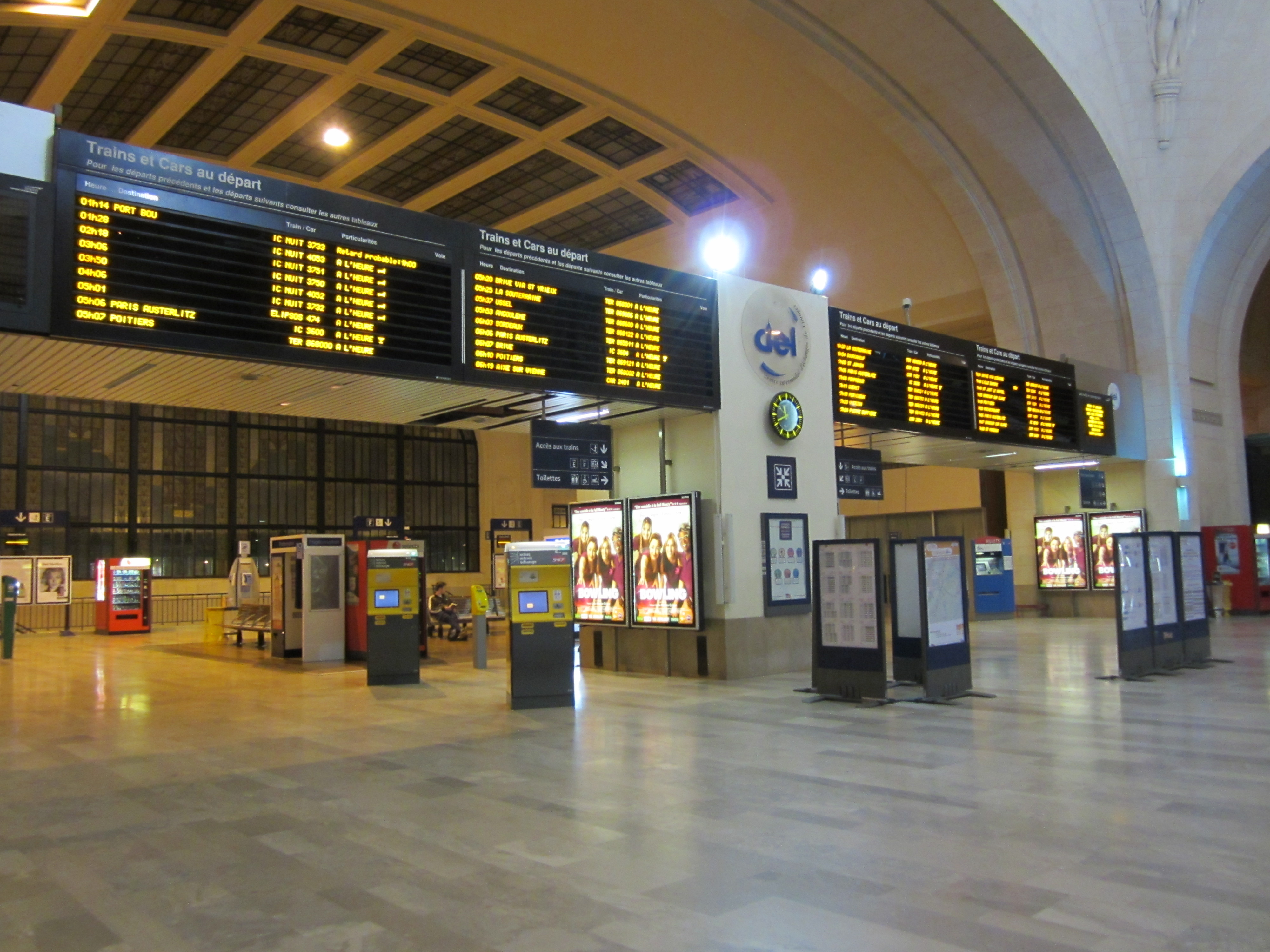 Intérieur de la gare SNCF de Limoges-Bénédictins